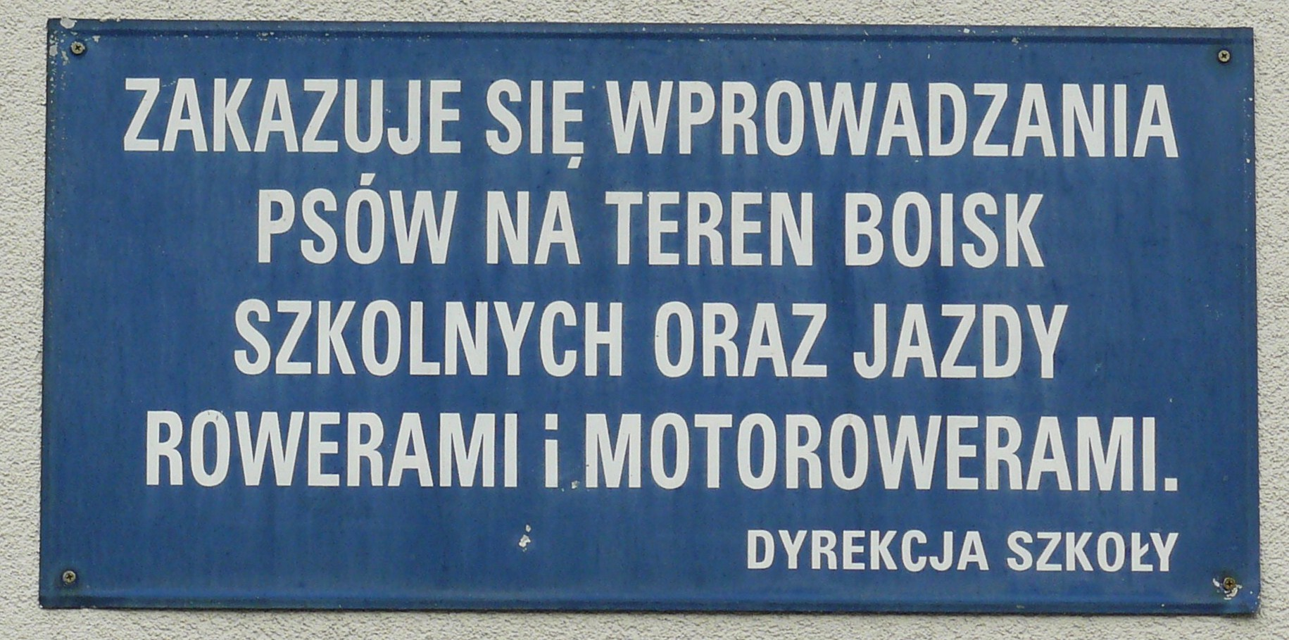 Szkoła przy ul. Łukaszewicza w Poznaniu.